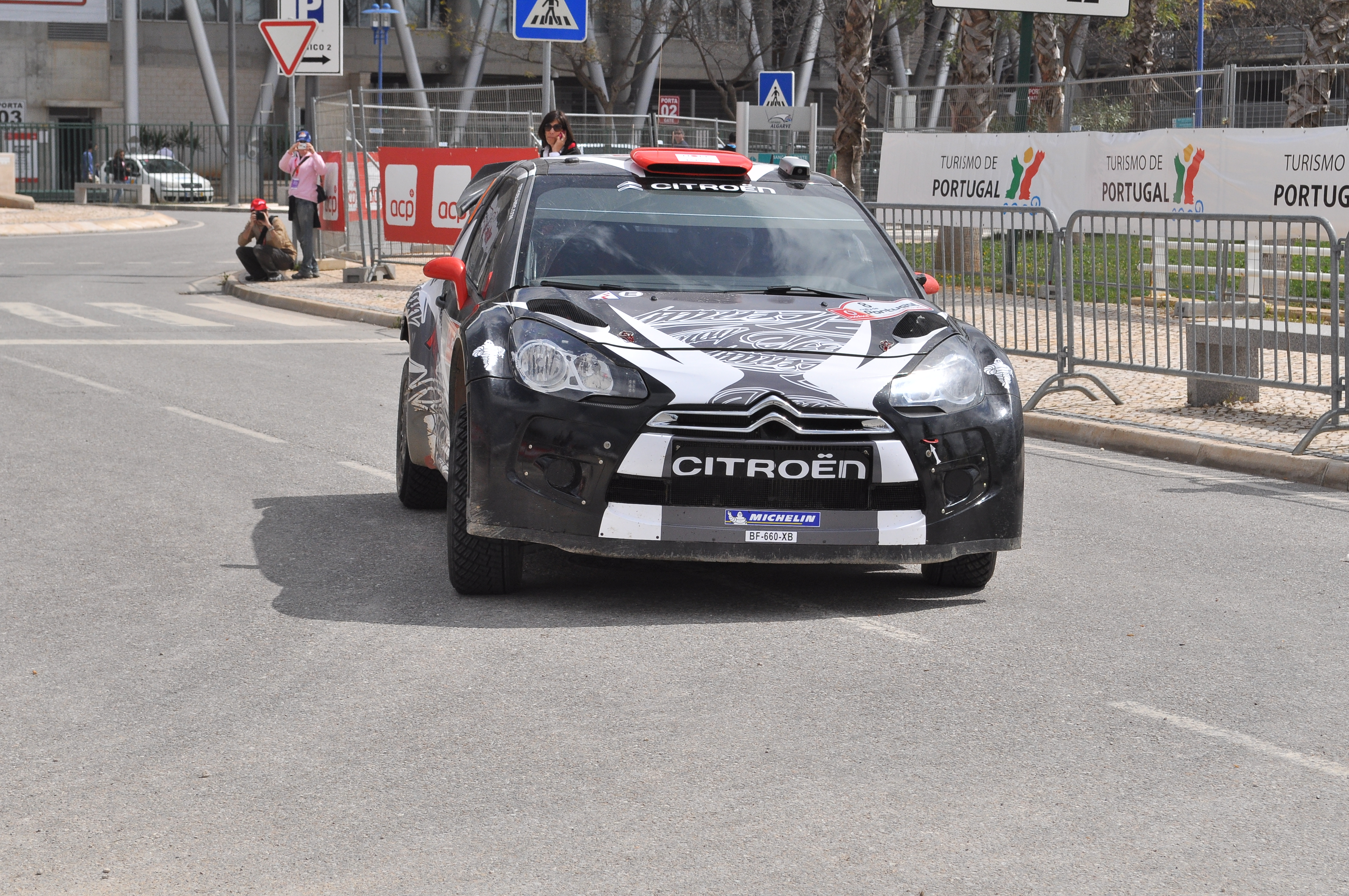 Vodafone Rally de Portugal 2011 - Zona de Assistência, Estádio do Algarve